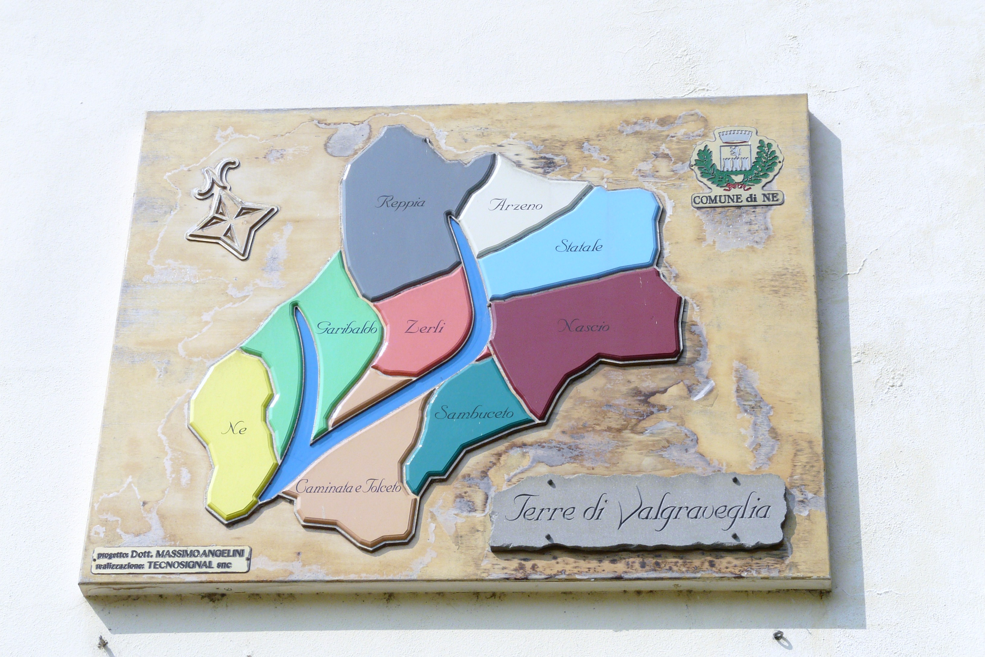 Targa-mappa della Val Graveglia, Liguria, Italia